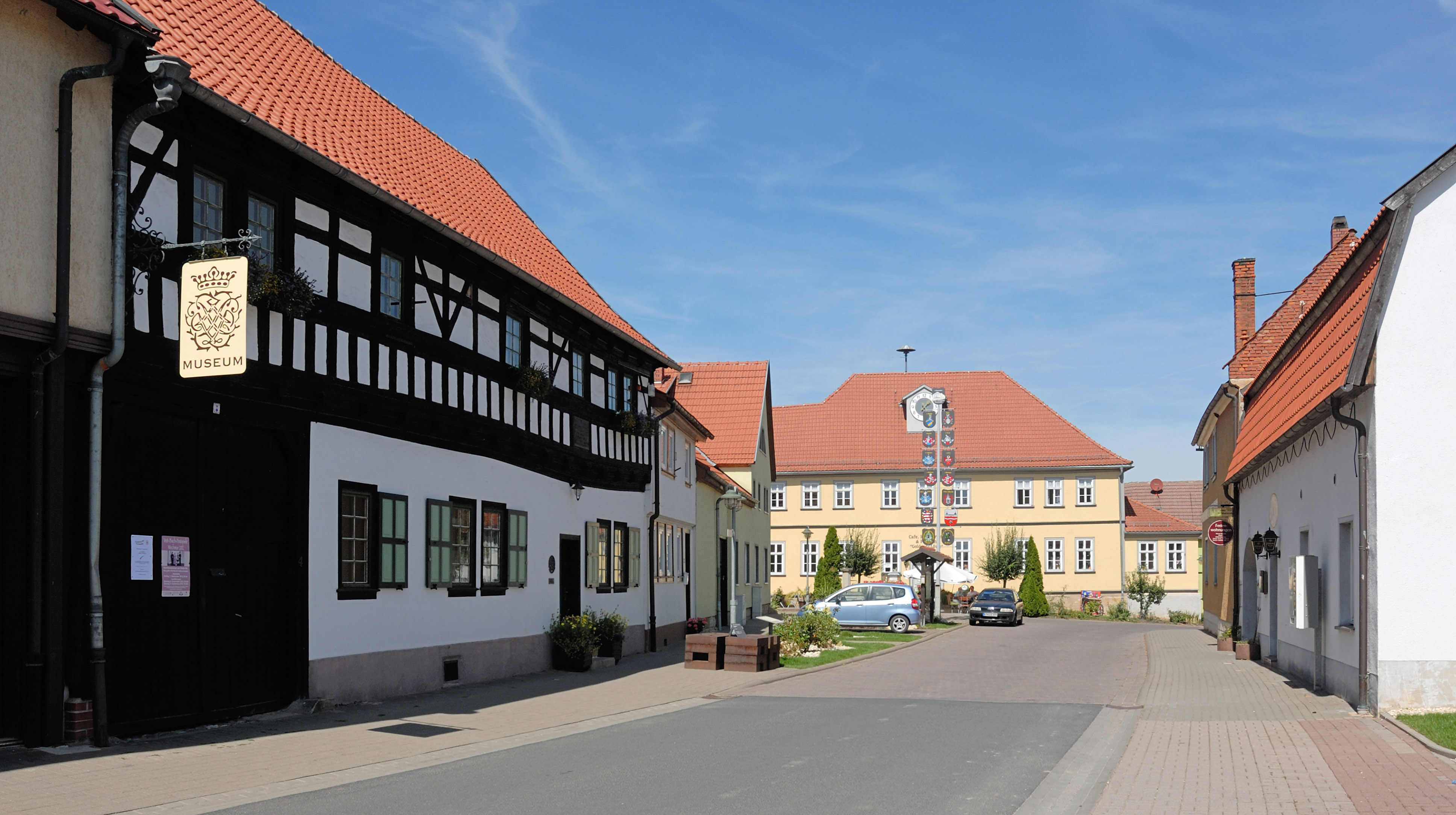 Bachhaus + Bach Museum